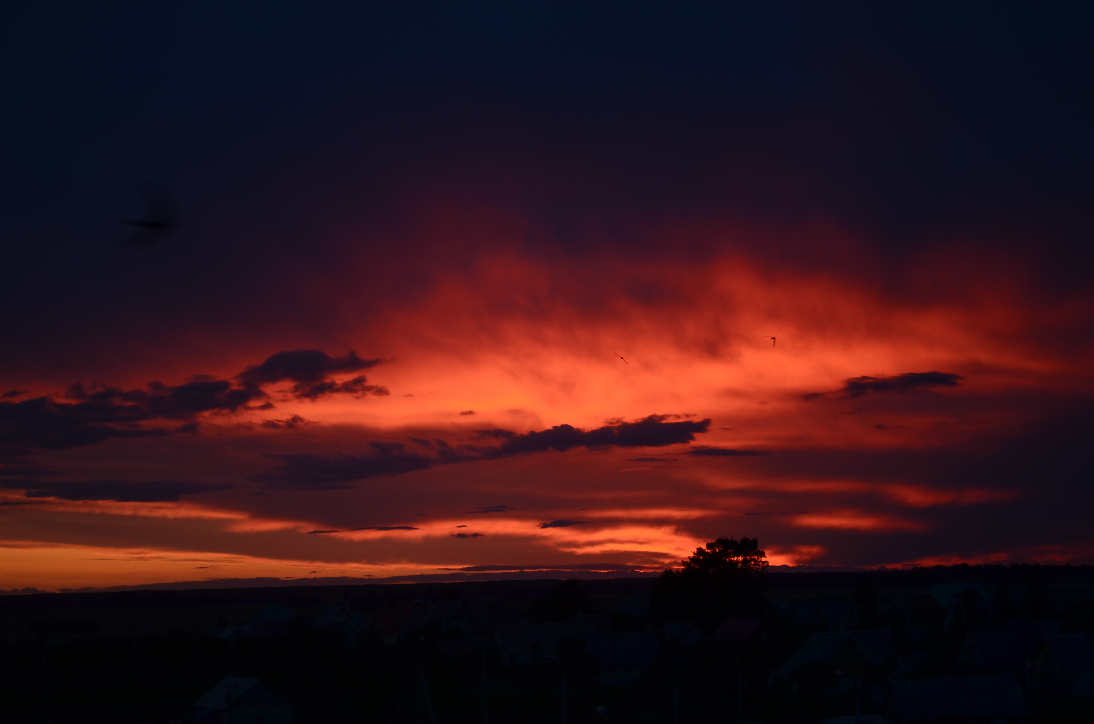 Sutemos. Kėdainiai